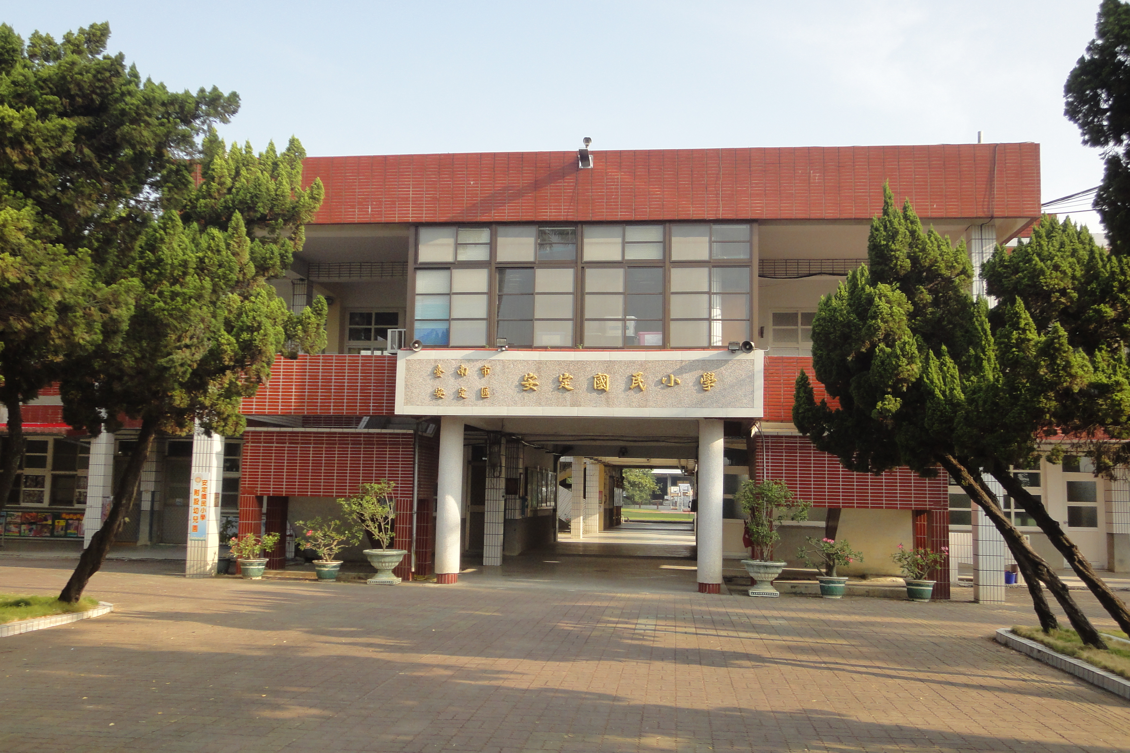 台南市安定區安定國小